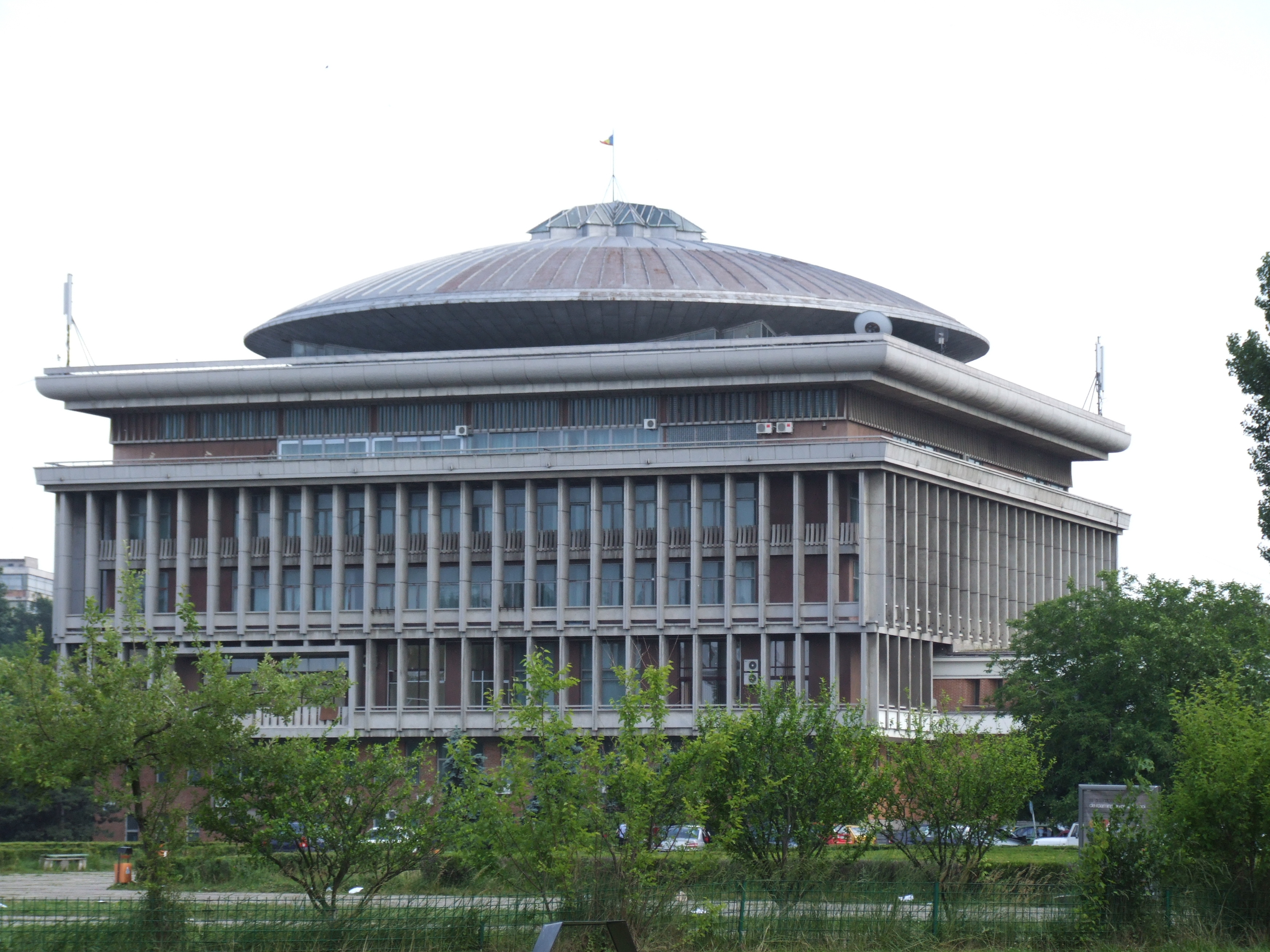 Rectorat